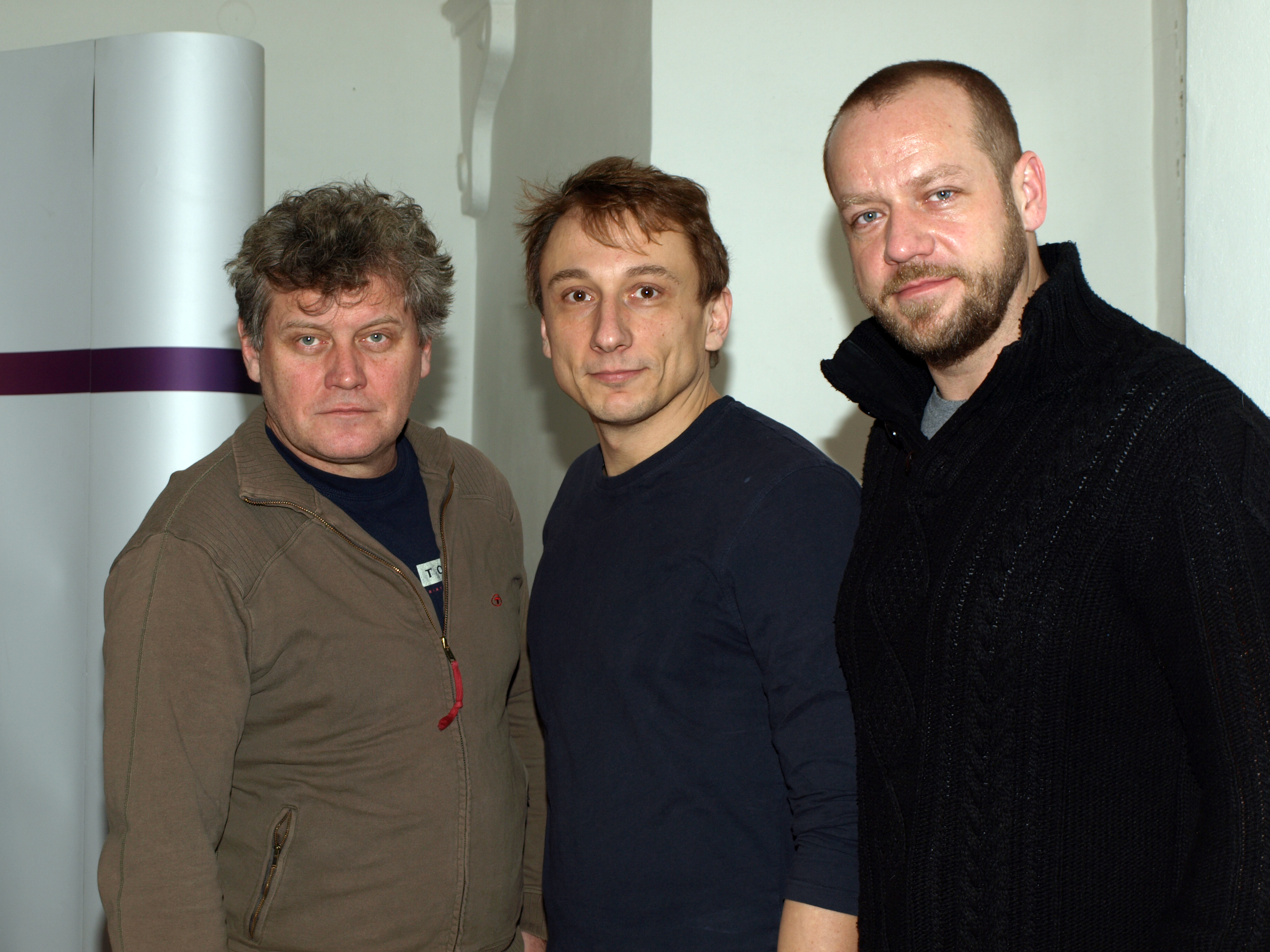 Případy 1. oddělení - Autor: Blanka Borová pro & 10Mpix.cz